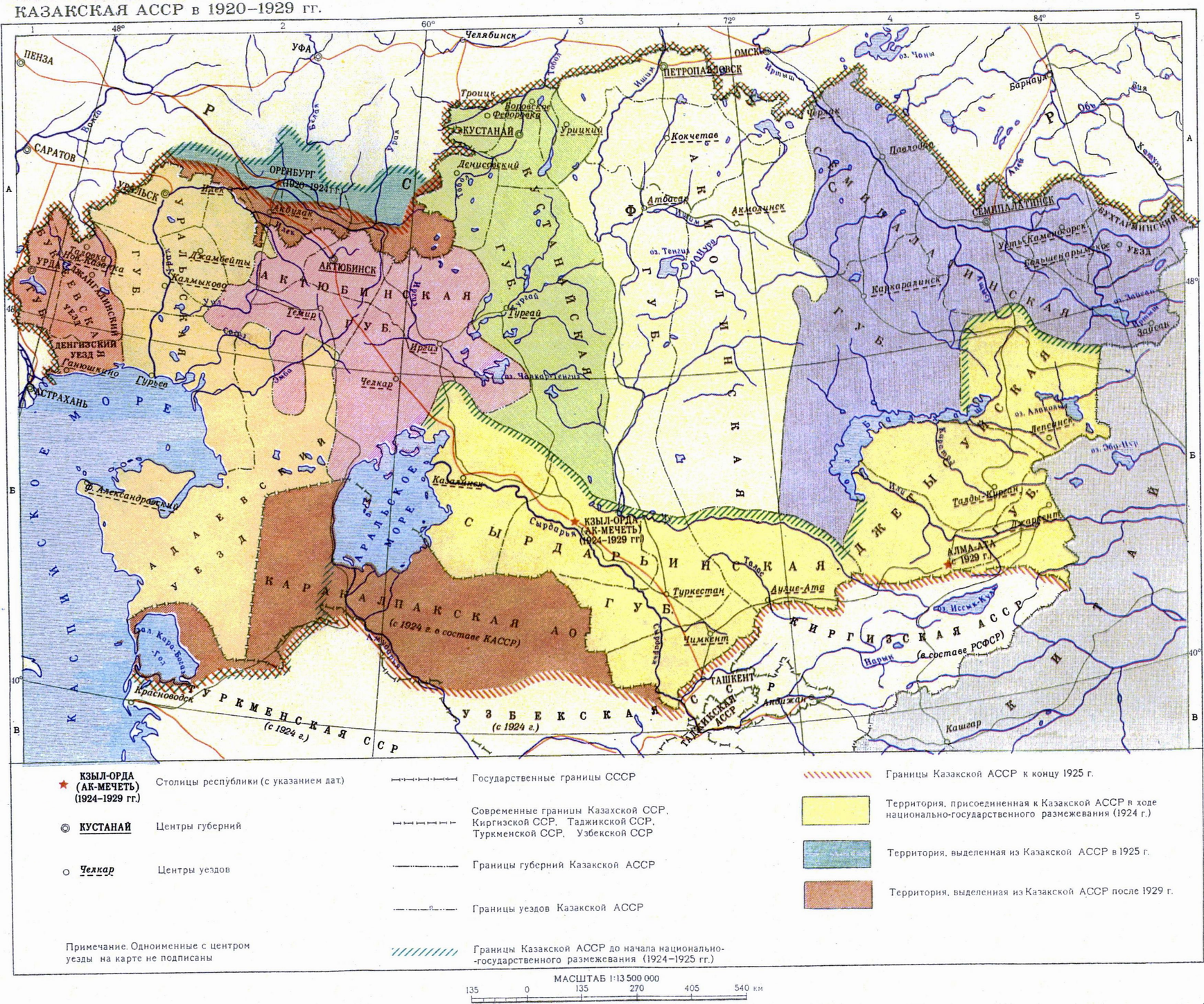 карта КАССР